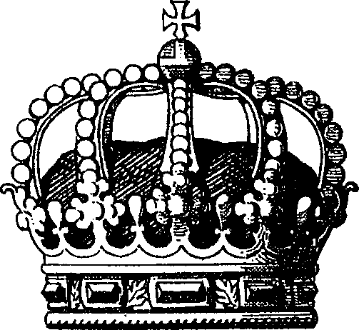 "Fig. 2. Grossherzogskrone. [Kronprinzenkrone.] Krone mit acht Spangen und niederer Purpurmütze. Von manchen Staaten - Belgien, Dänemark, Portugal, Schweden und Norwegen - wird dieselbe auch als Königskrone geführt. Wir finden sie ausserdem noch in den Staatswappen von Anhalt, Braunschweig, Luxemburg, Monaco, Reuss ältere und jüngere Linie, Sachsen-Meiningen, Sachsen-Coburg und Gotha."